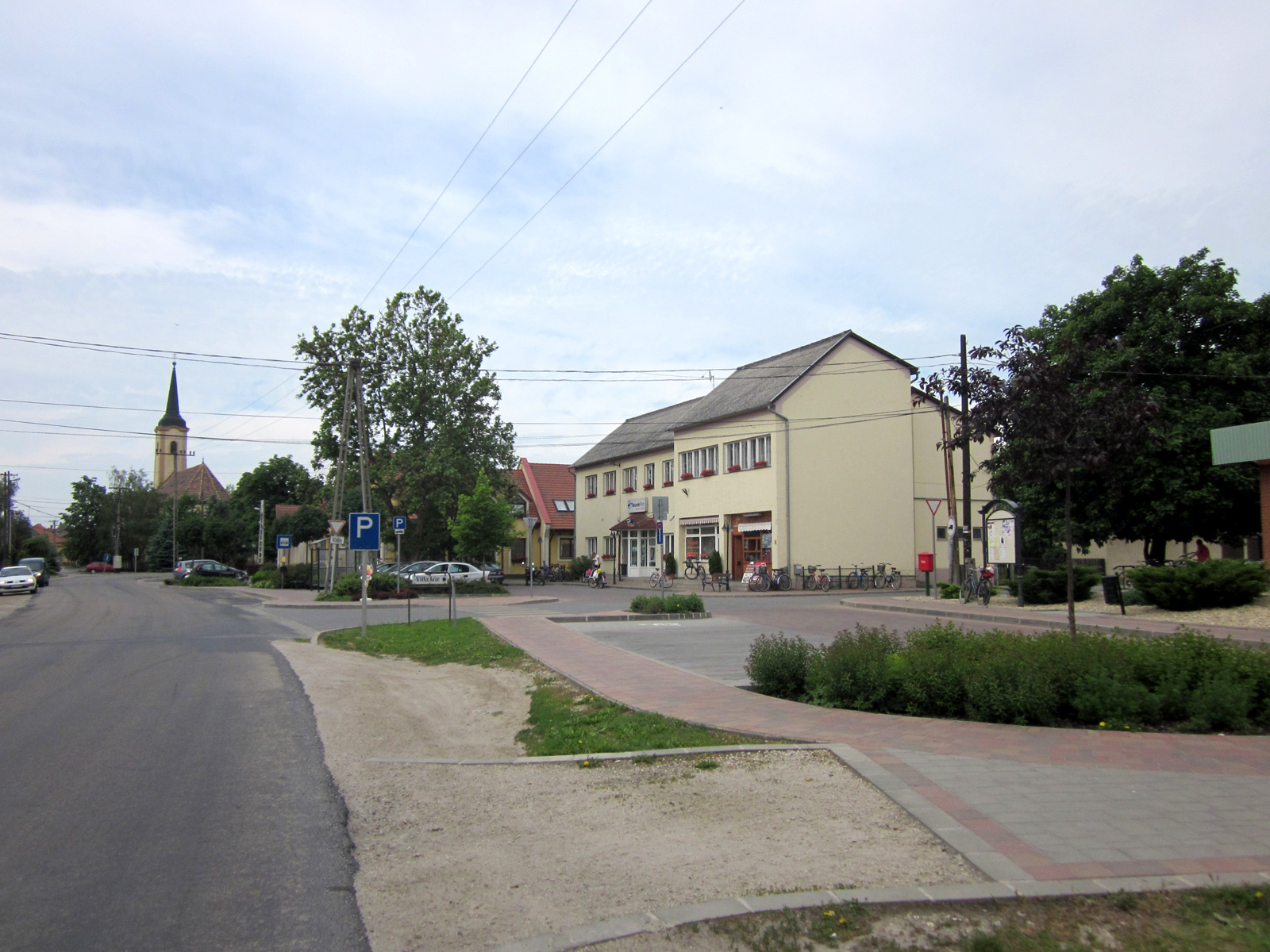 Szent Kereszt felmagasztalása-templom, Dunakiliti, Hungary